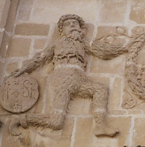 Persona foto kiun mi donas sub GNU